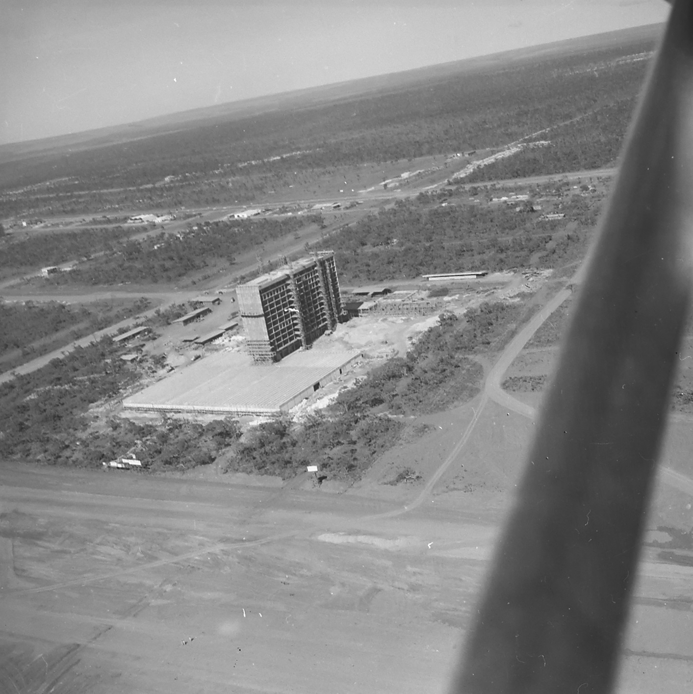 Vista aérea de prédio em construção do Hospital Distrital (atual Hospital de Base do Distrito Federal)